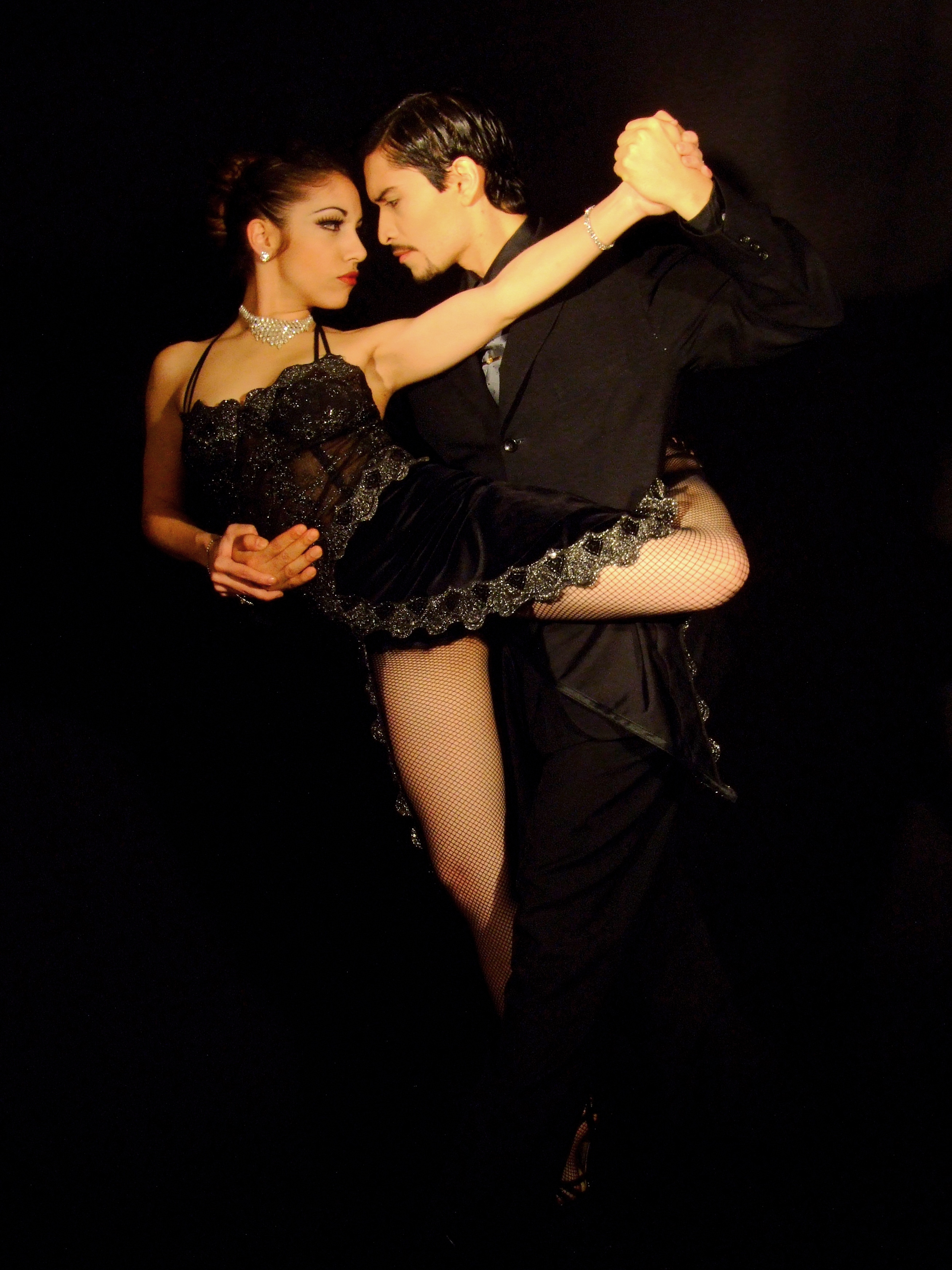 Tango dance, Buenos Aires, Argentina